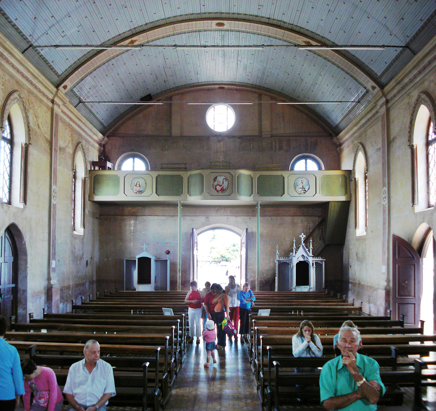 Interior da antiga Matriz de Caravaggio, Farroupilha, Brasil